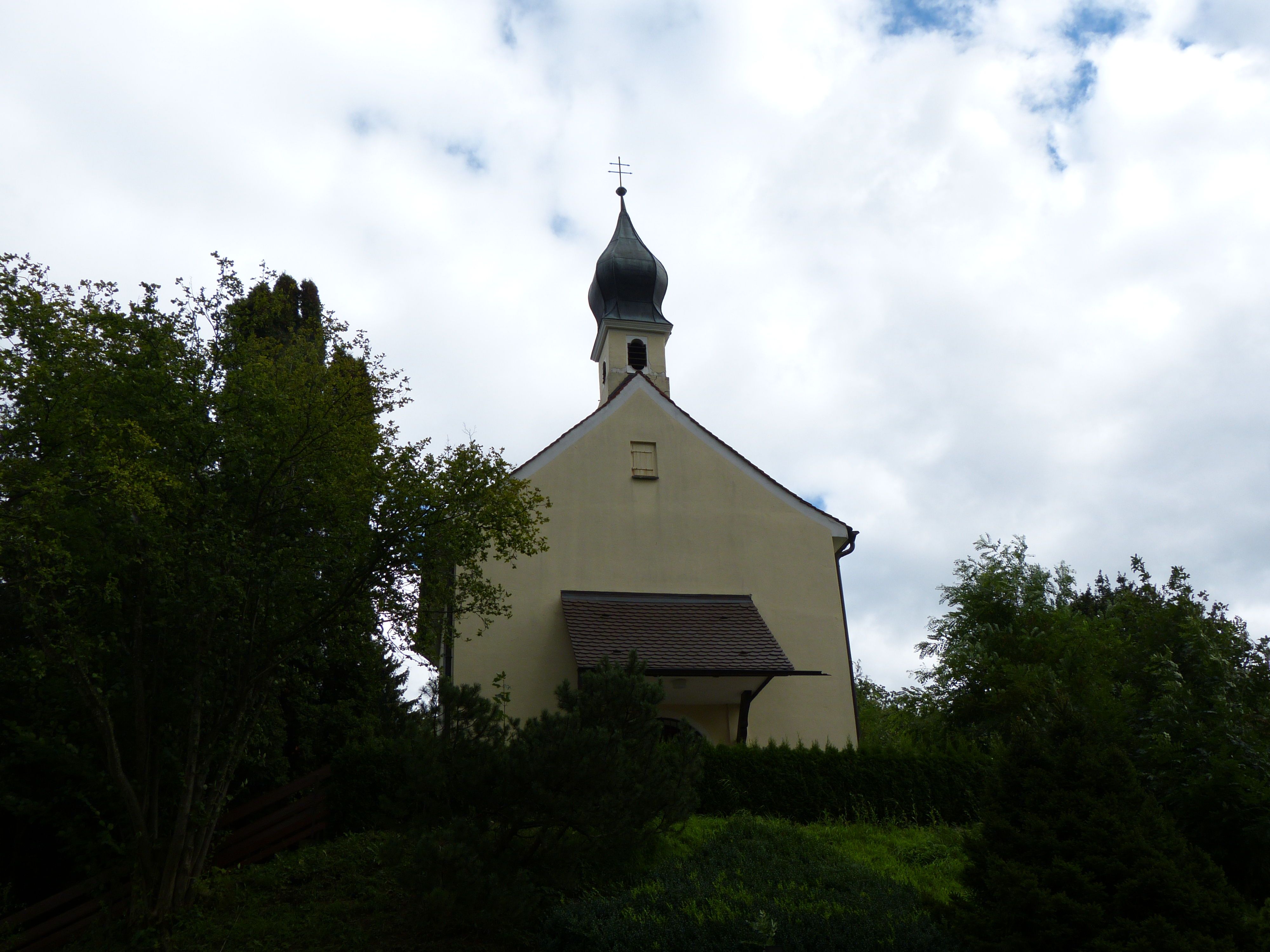 Kriegergedächtniskapelle, kleiner, kreuzgratgewölbter Bau mit rundem Schluss, im Auftrag des Grafen Hans Fugger erbaut, 1627; mit Ausstattung; im ehem. Burgstall gelegenThis is a photograph of an architectural monument.